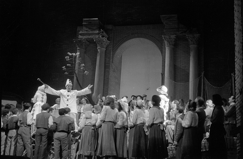 Original image description from the Deutsche Fotothek Szenenbilder